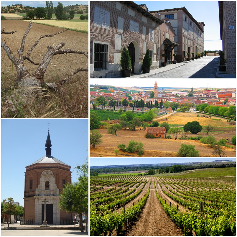 Municipio de Rueda, Valladolid.